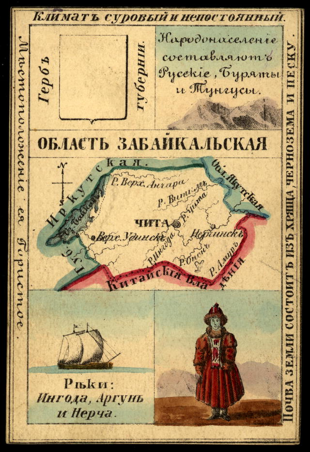 Карточка для игры в лото 104х71 мм. внешняя сторона. Российская империя, 1856 г.